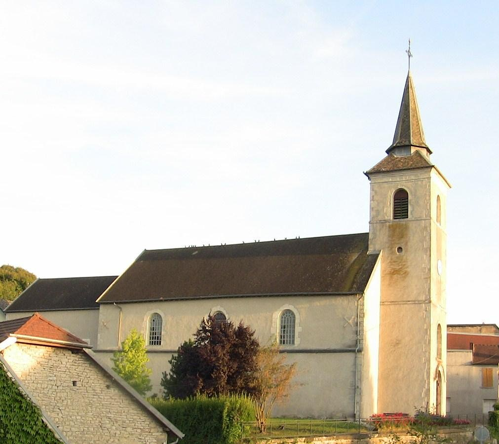 Église de Cussey-sur-l'Ognon (Doubs)